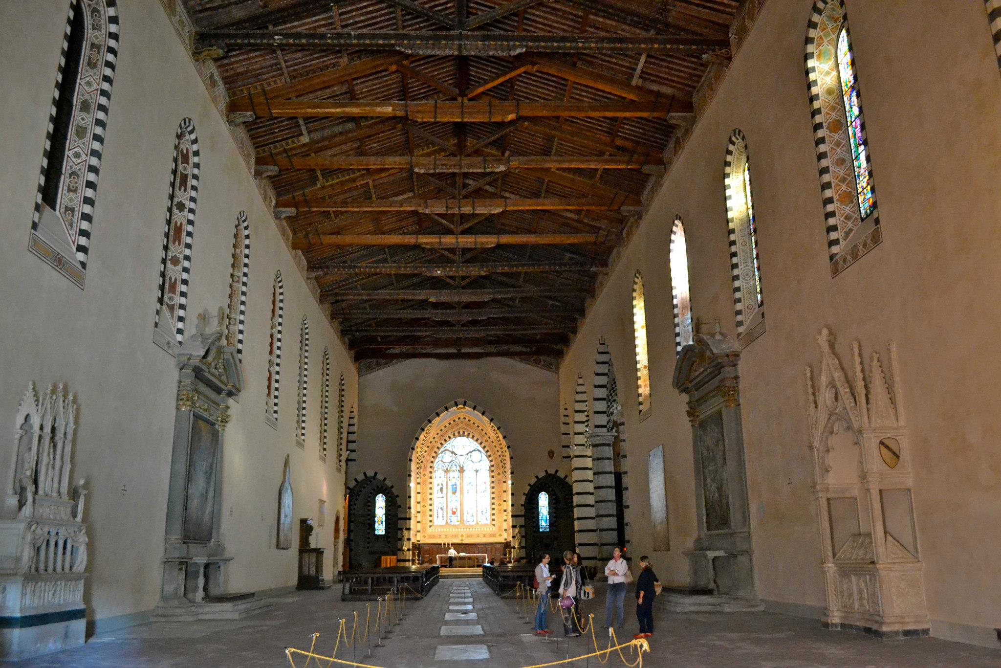 Pisa, s. caterina, int.